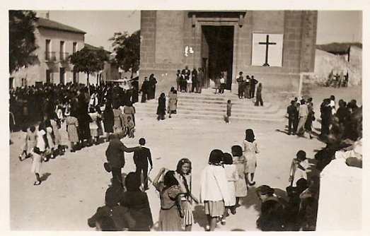 Plaza de la iglesia (actual plaza de España) durante una celebración.